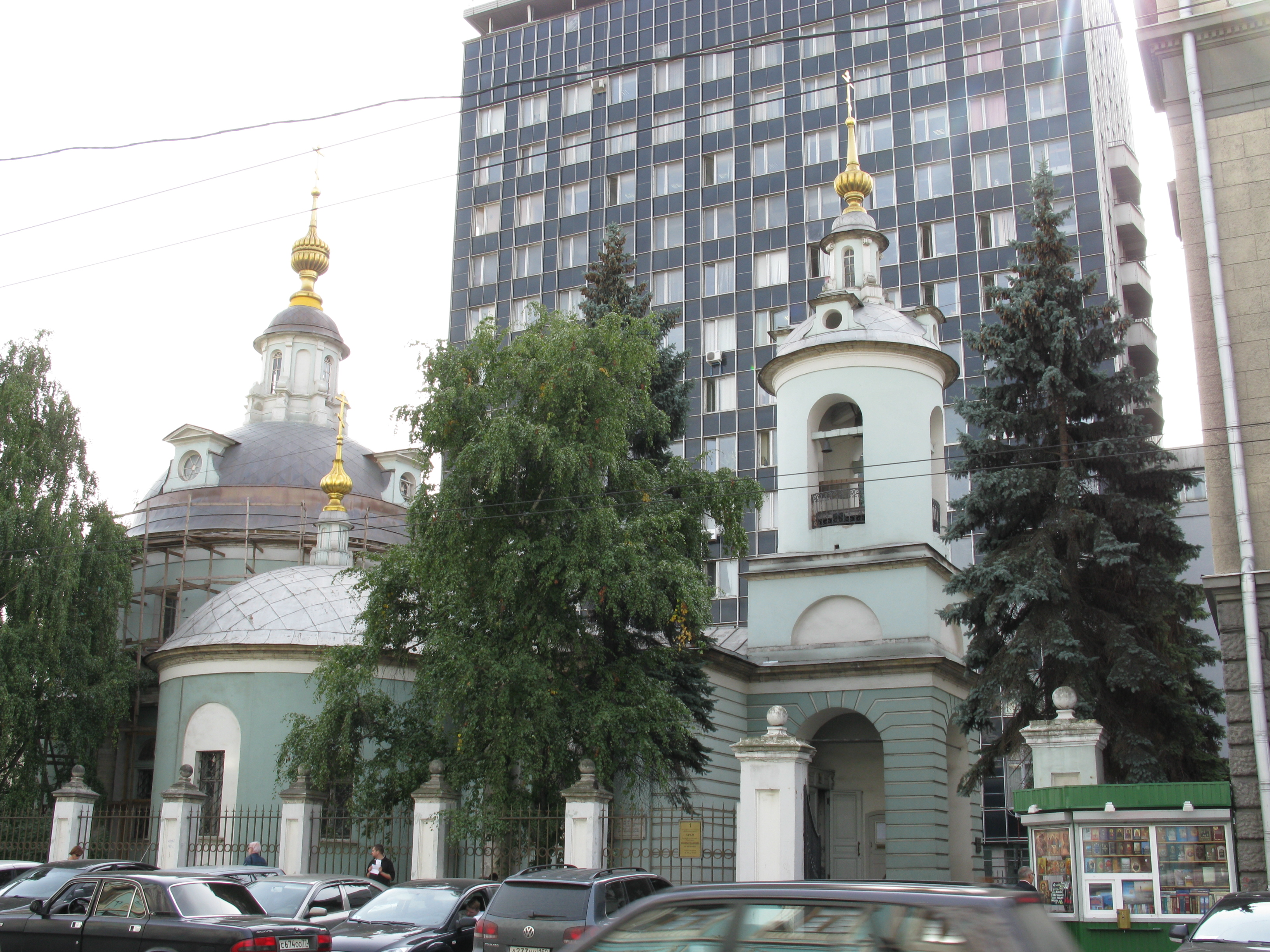 Церковь Космы и Дамиана на Маросейке